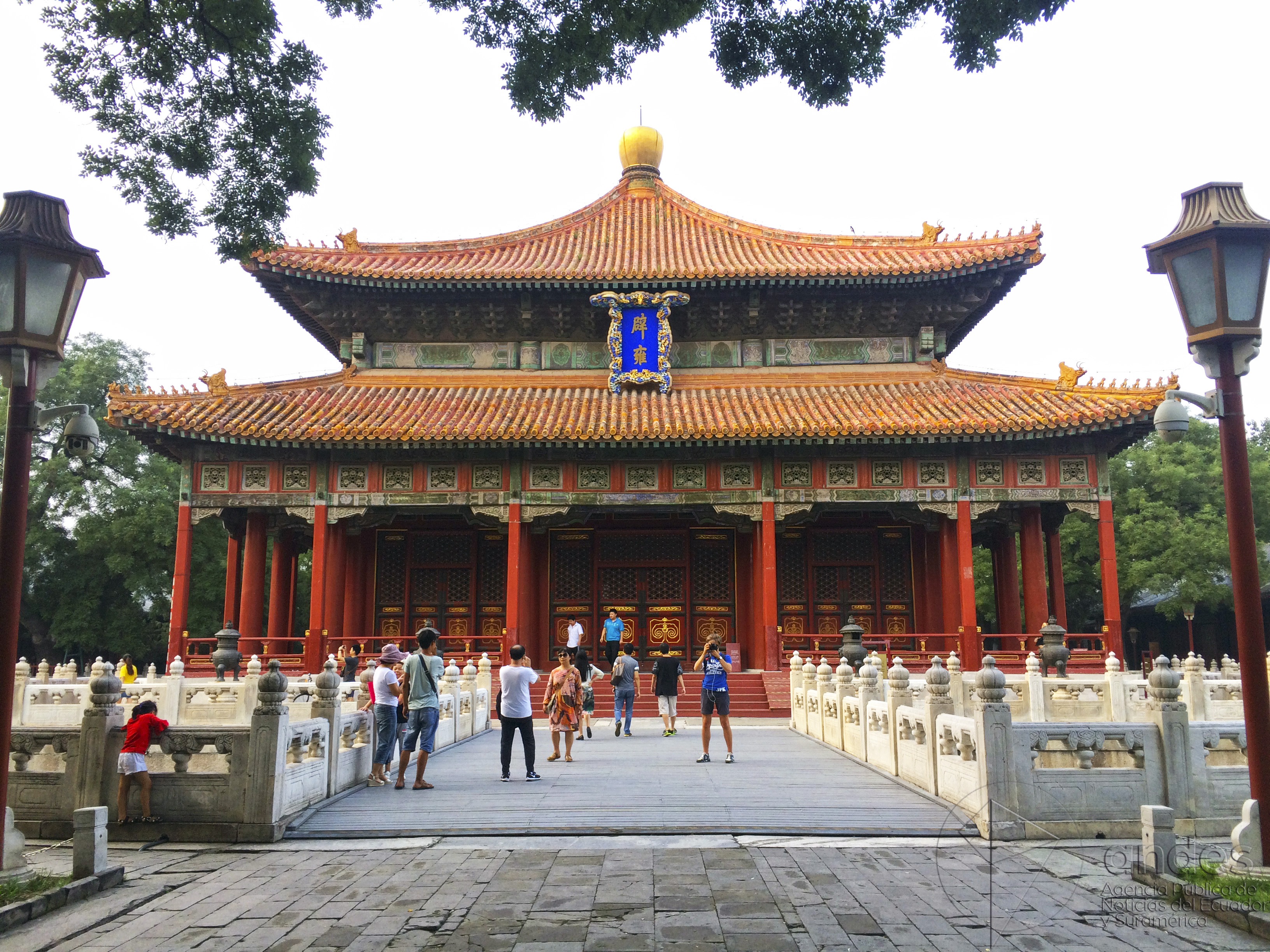 El Templo de Confucio (chino tradicional: 孔廟, chino simplificado: 孔庙, pinyin: Kǒng Miào) en Qufu, provincia de Shandong, China, es el templo de Confucio "original", el más amplio y conocido de Asia Oriental. ANDES/Lizette Abril